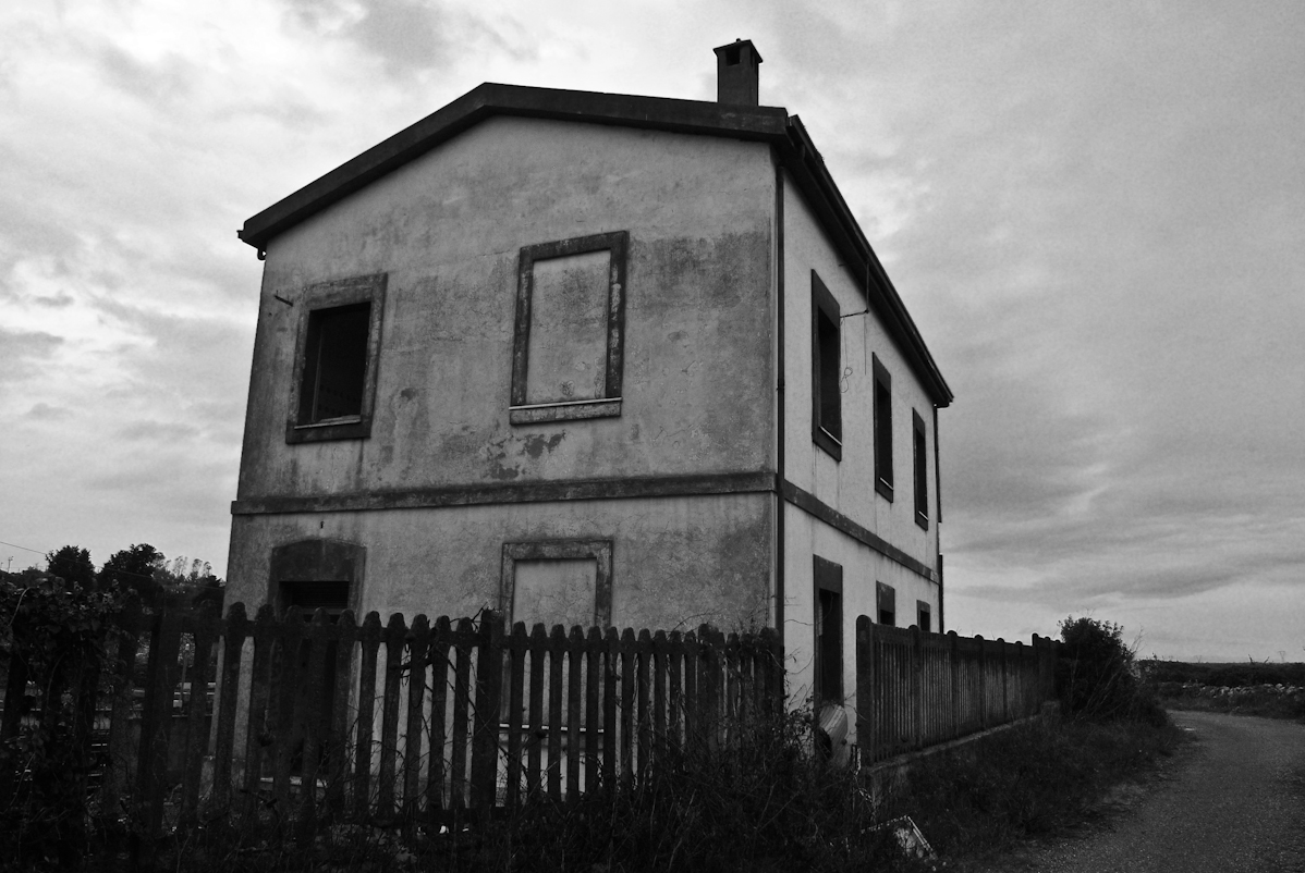 Paulilatino, Stazione ferroviaria di Paulilatino: la casa cantoniera.